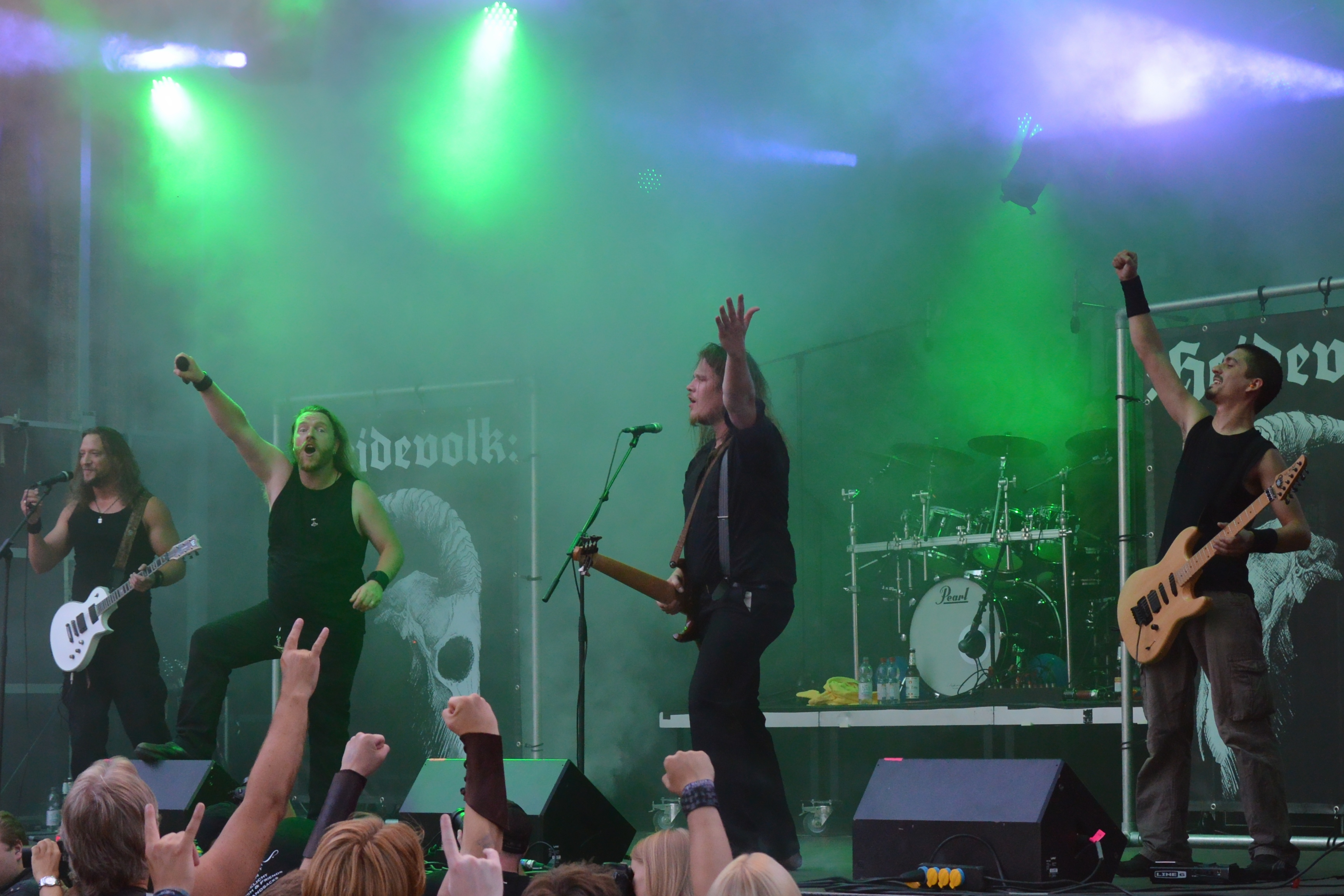 Heidevolk beim Burgfolk Festival 2013 auf Schloß Broich